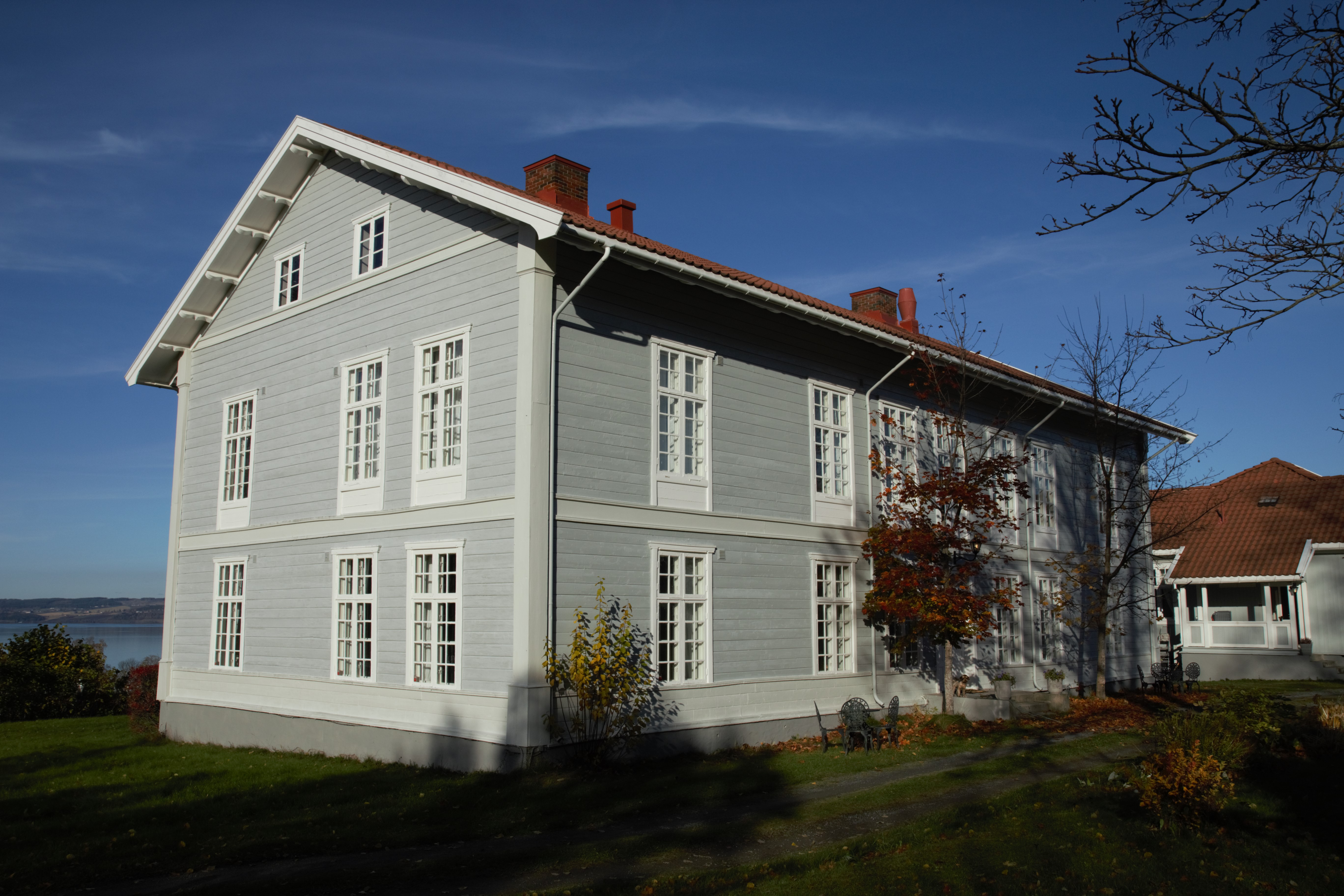 Skrivergarden på Kapp 2 betal